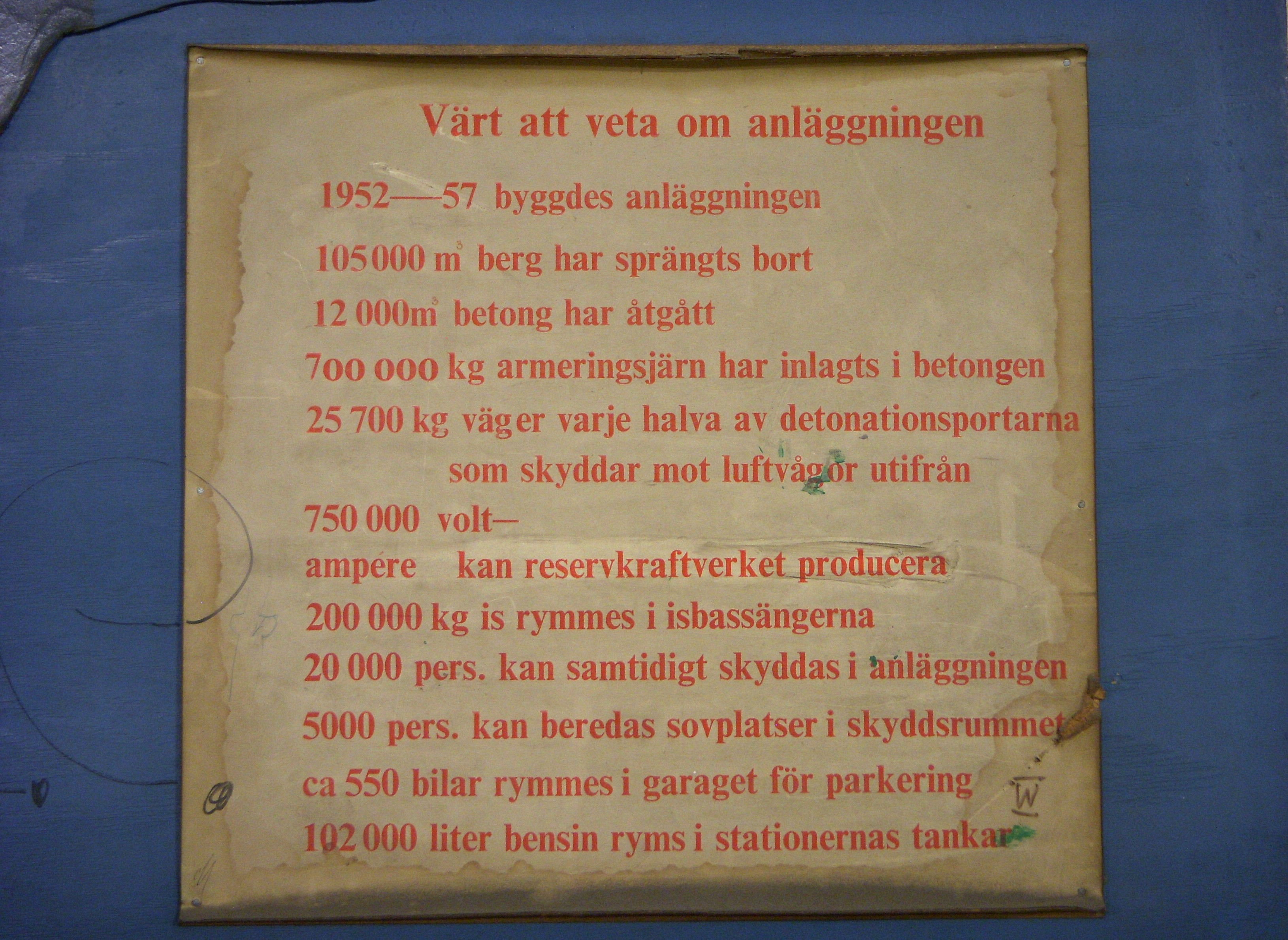 Katarinabergets skyddsrum, informationstavla